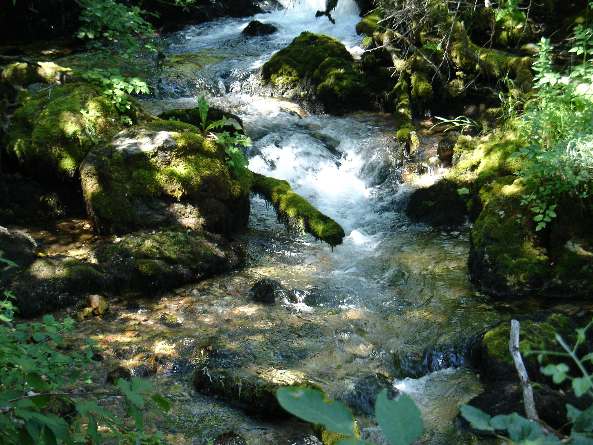 Bronnen bij Vevcani, Macedonië